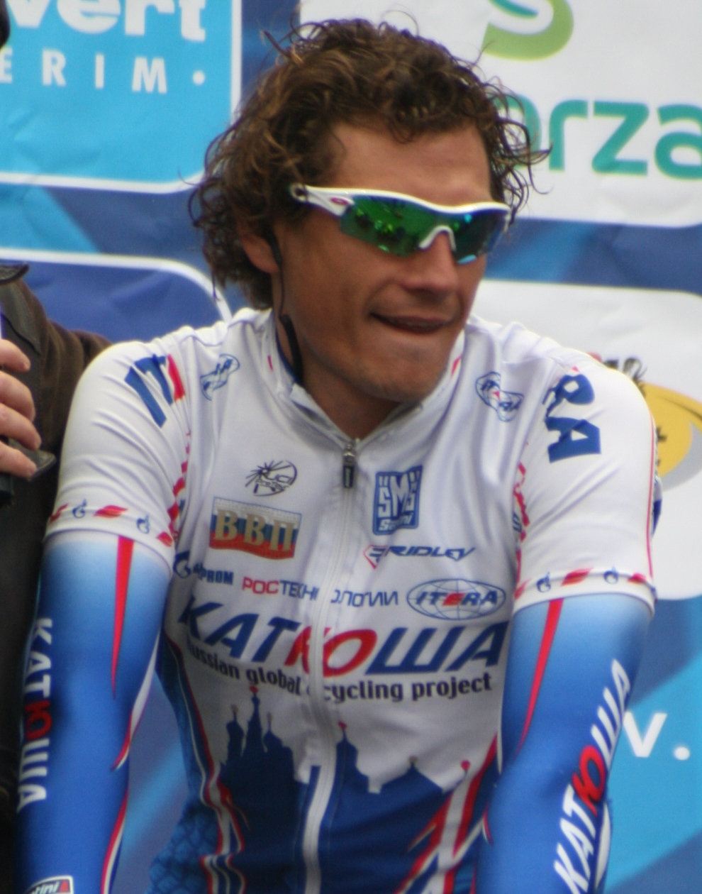 Filippo Pozzato au départ du Tour des Flandres 2009